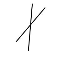 Esou gett eng Wandmillen op enger Landkaart duergestallt.